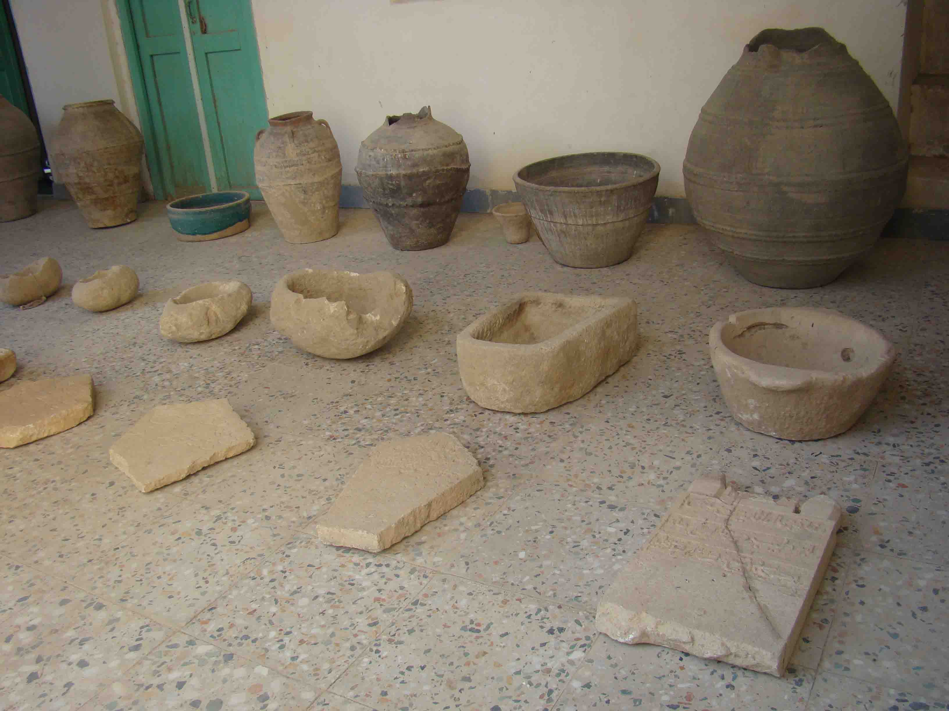 موزه شخصی کرامت اله تقوي